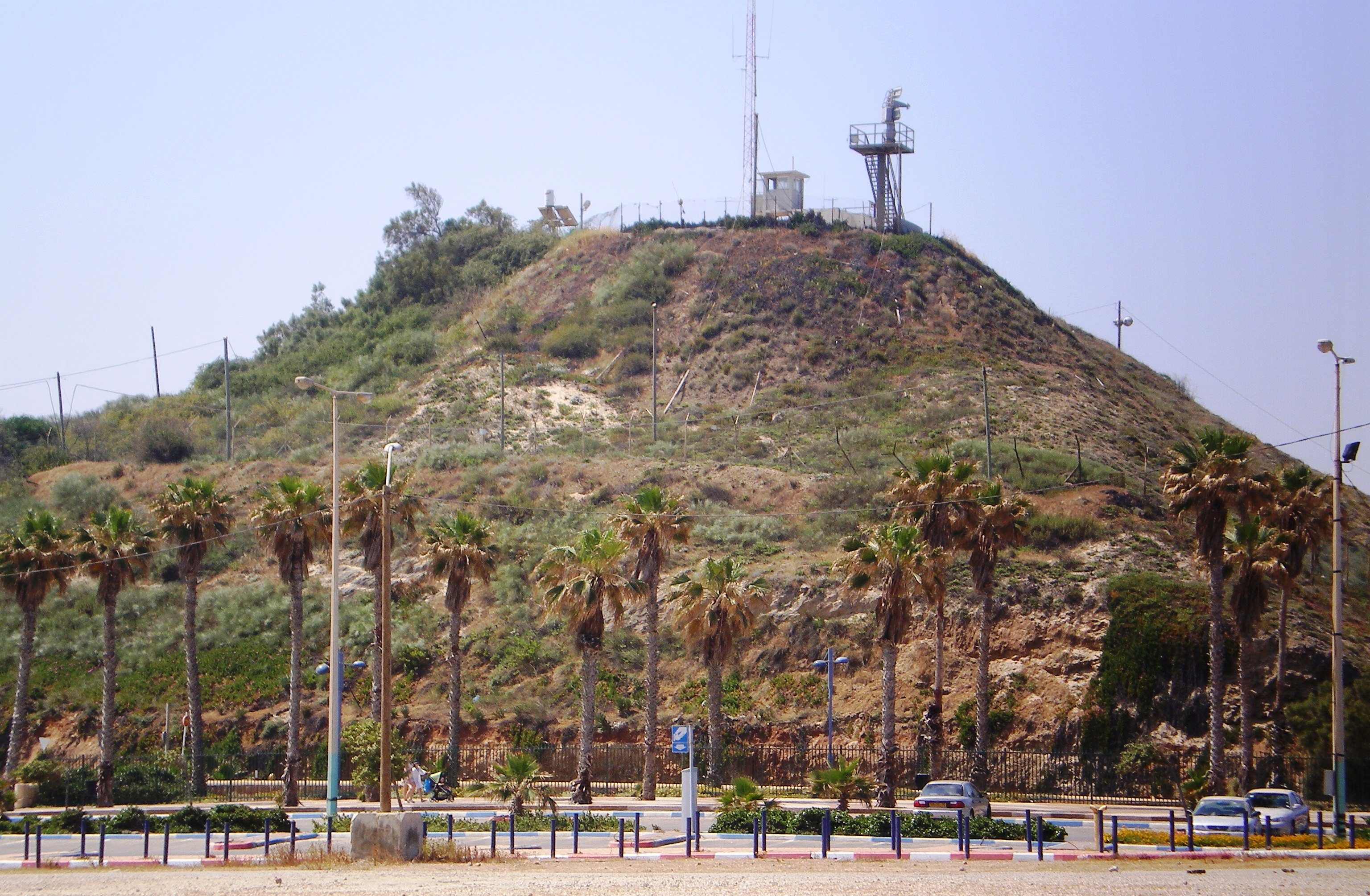 תל יונה